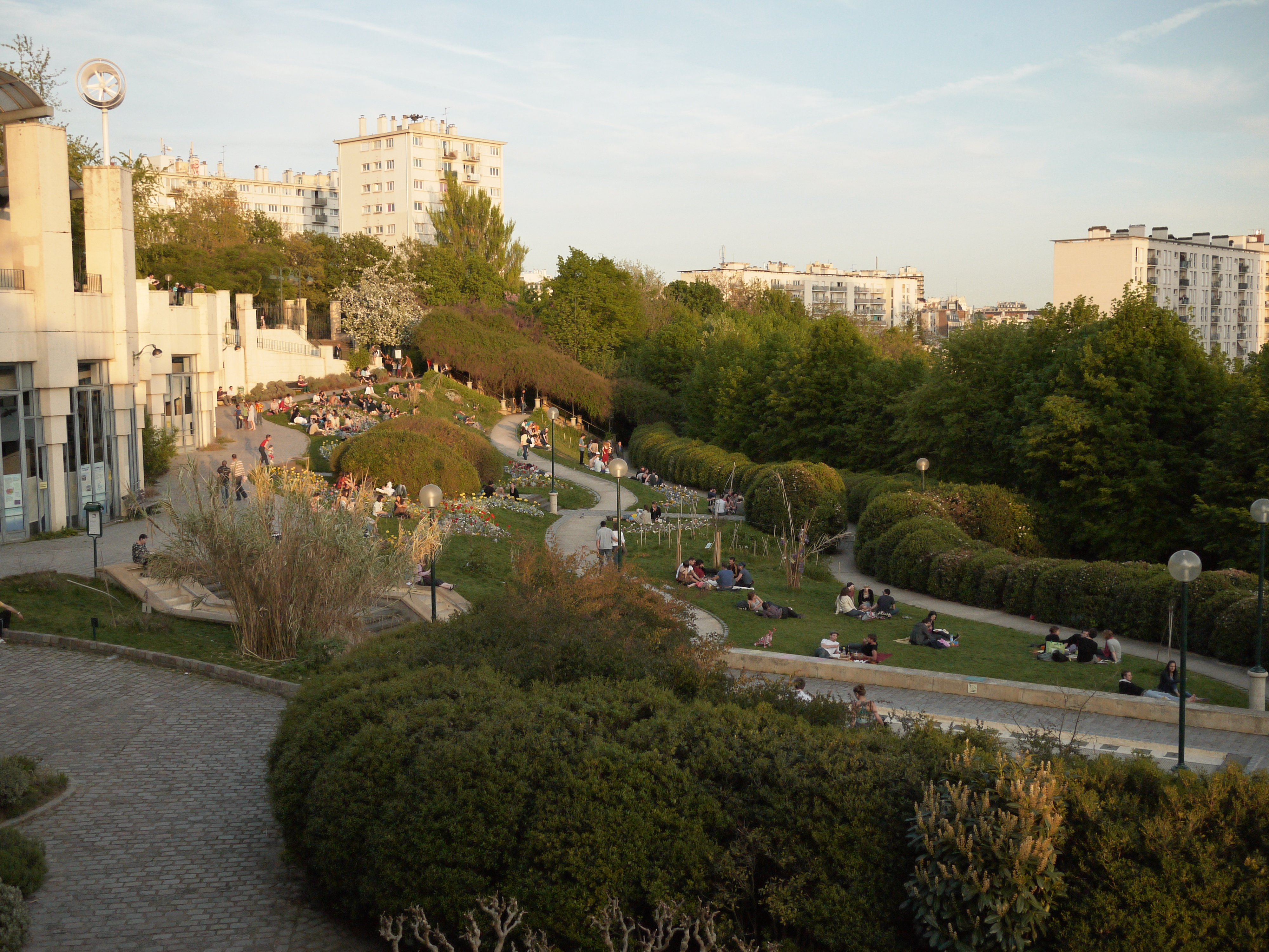 Parc de Belleville